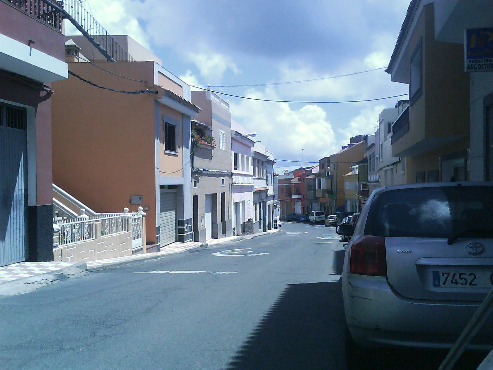 Barrio de La Angostura (Gran Canaria)